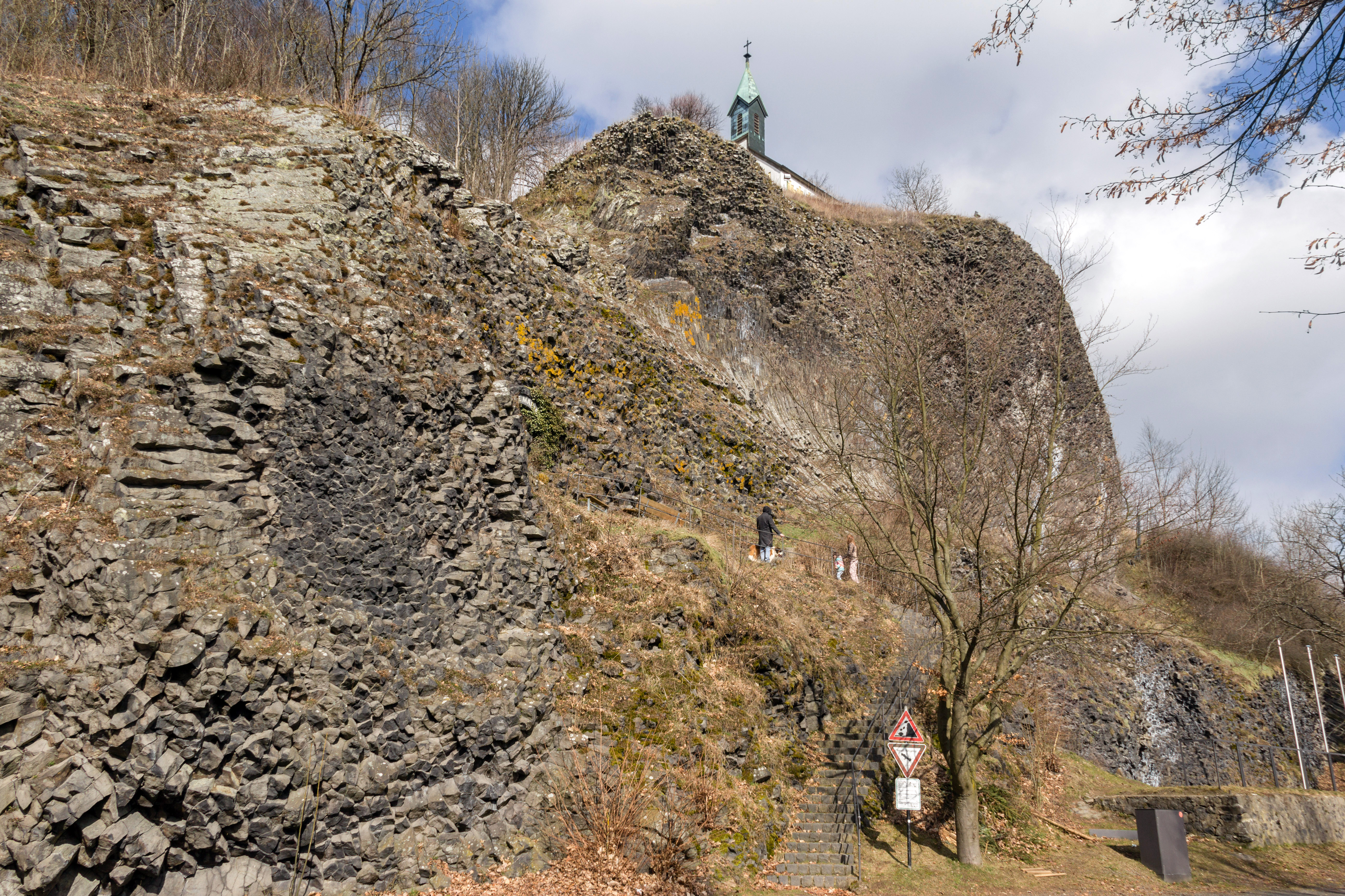 Basaltkegel Parkstein, Naturschutz- und FFH-Gebiet Parkstein